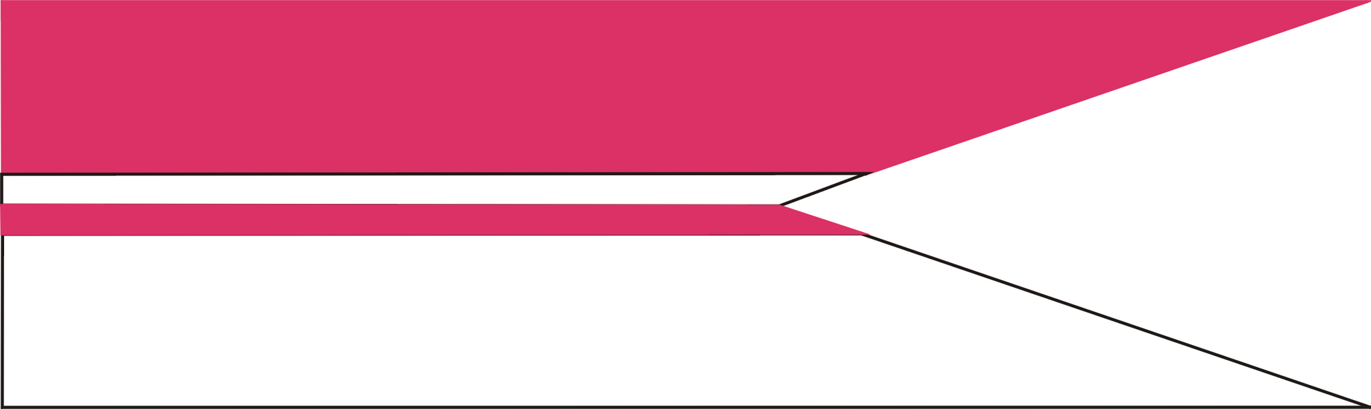 Barwy - proporczyk 9 Pułku Ułanów Małopolskich